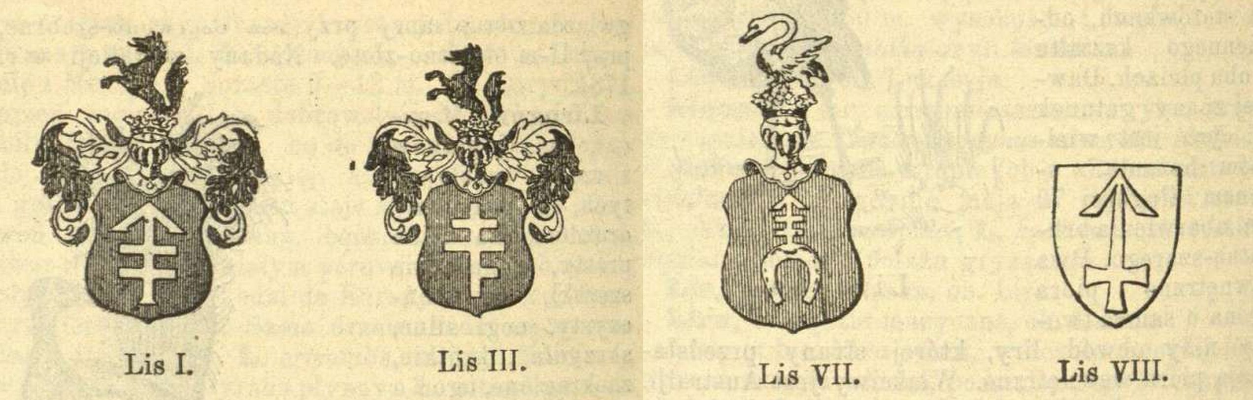 Herb Lis